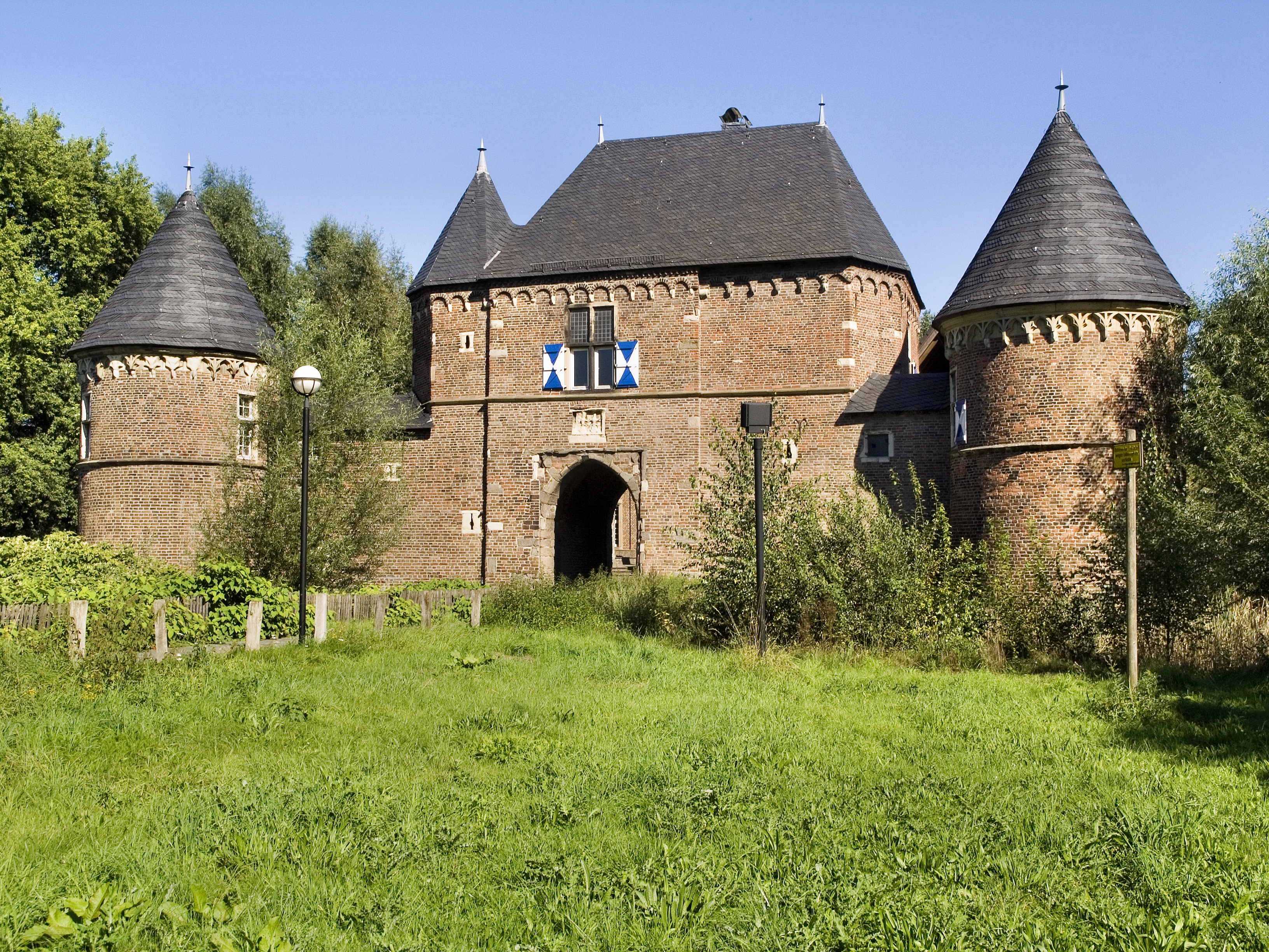 Северный Рейн-Вестфалия, Оберхаузен - замок Бург Фондерн